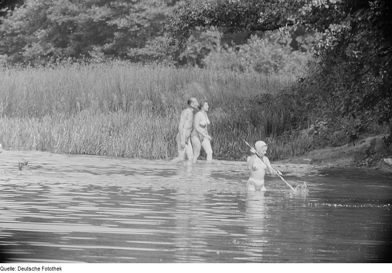 Original image description from the Deutsche FotothekBadende